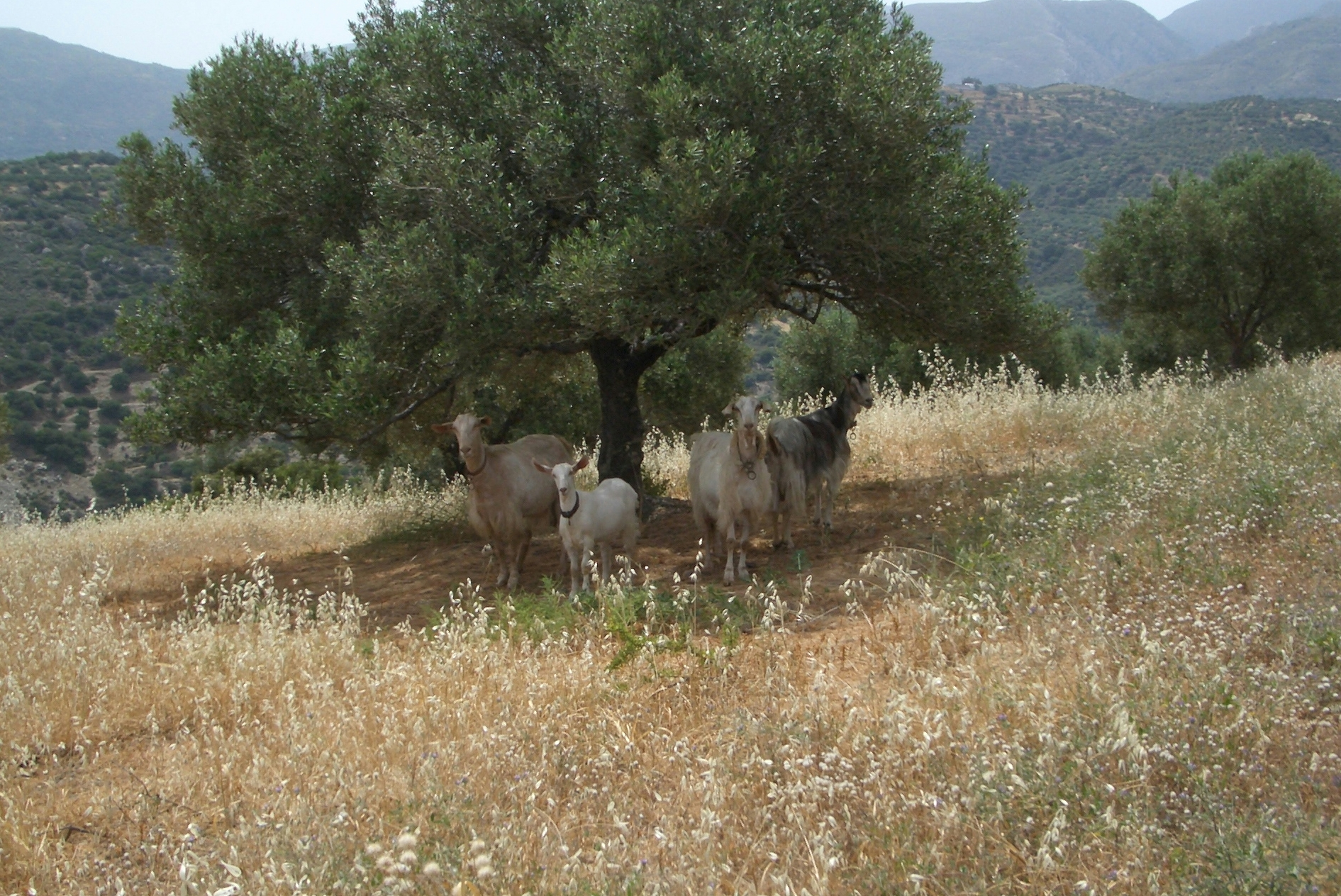 Des chèvres sous un olivier en Crète